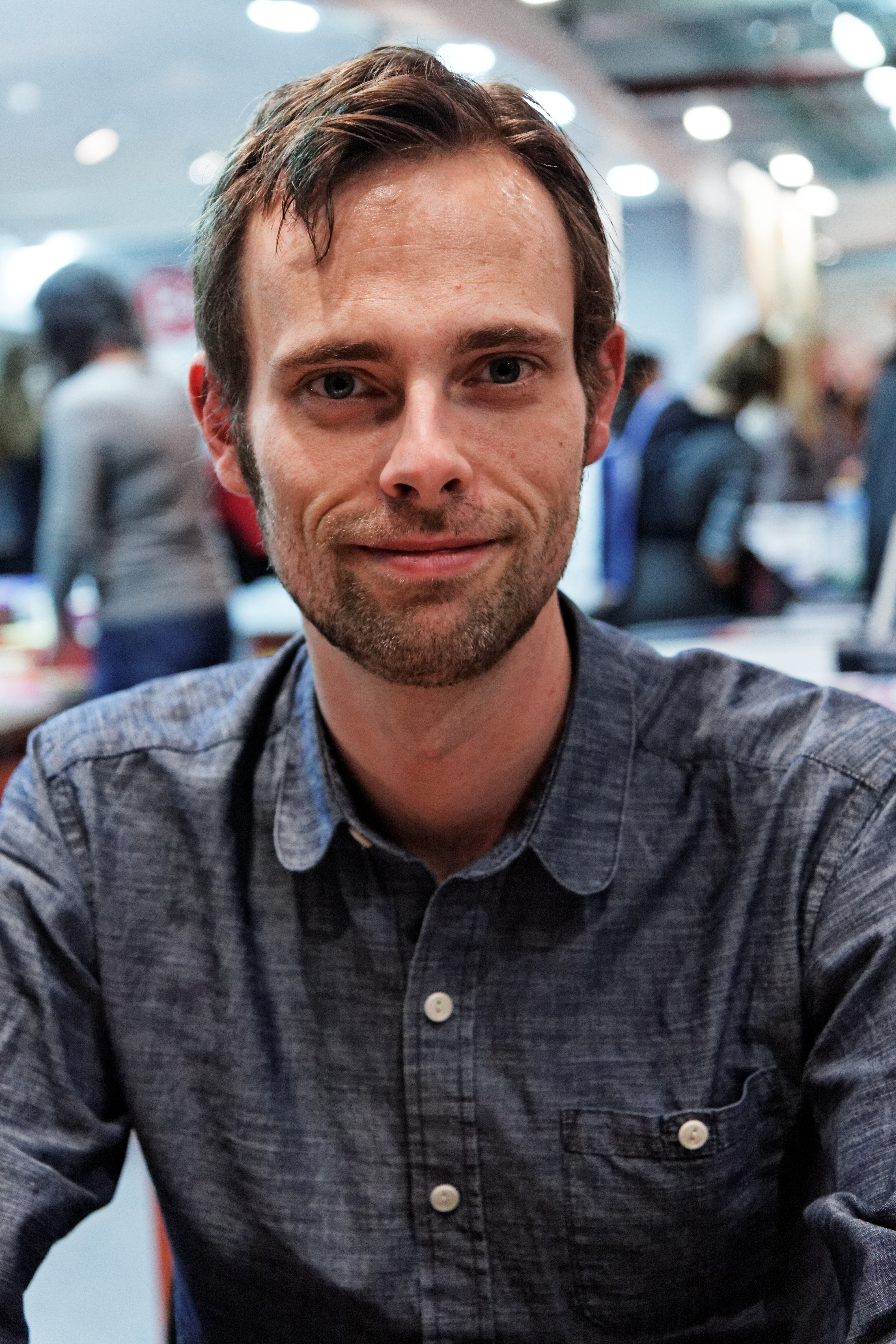 Ransom Riggs en dédicace au salon du livre jeunesse 2012 de Montreuil.